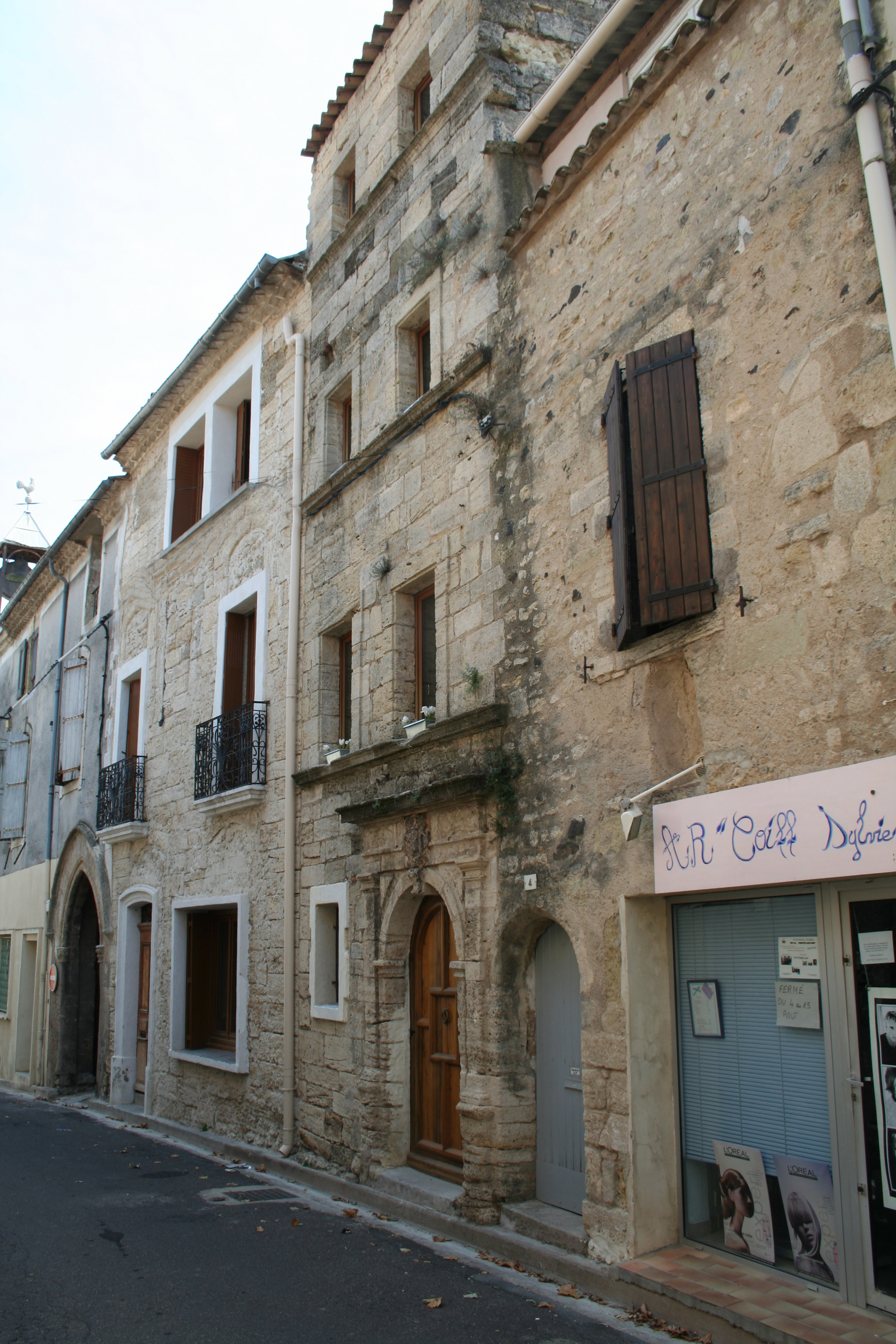 Tourbes (Hérault) - Maison XVe siècle dans la Grand-Rue.